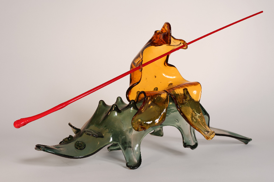 Andriy Bokotey, Tamer, blown glass, 2015.jpg